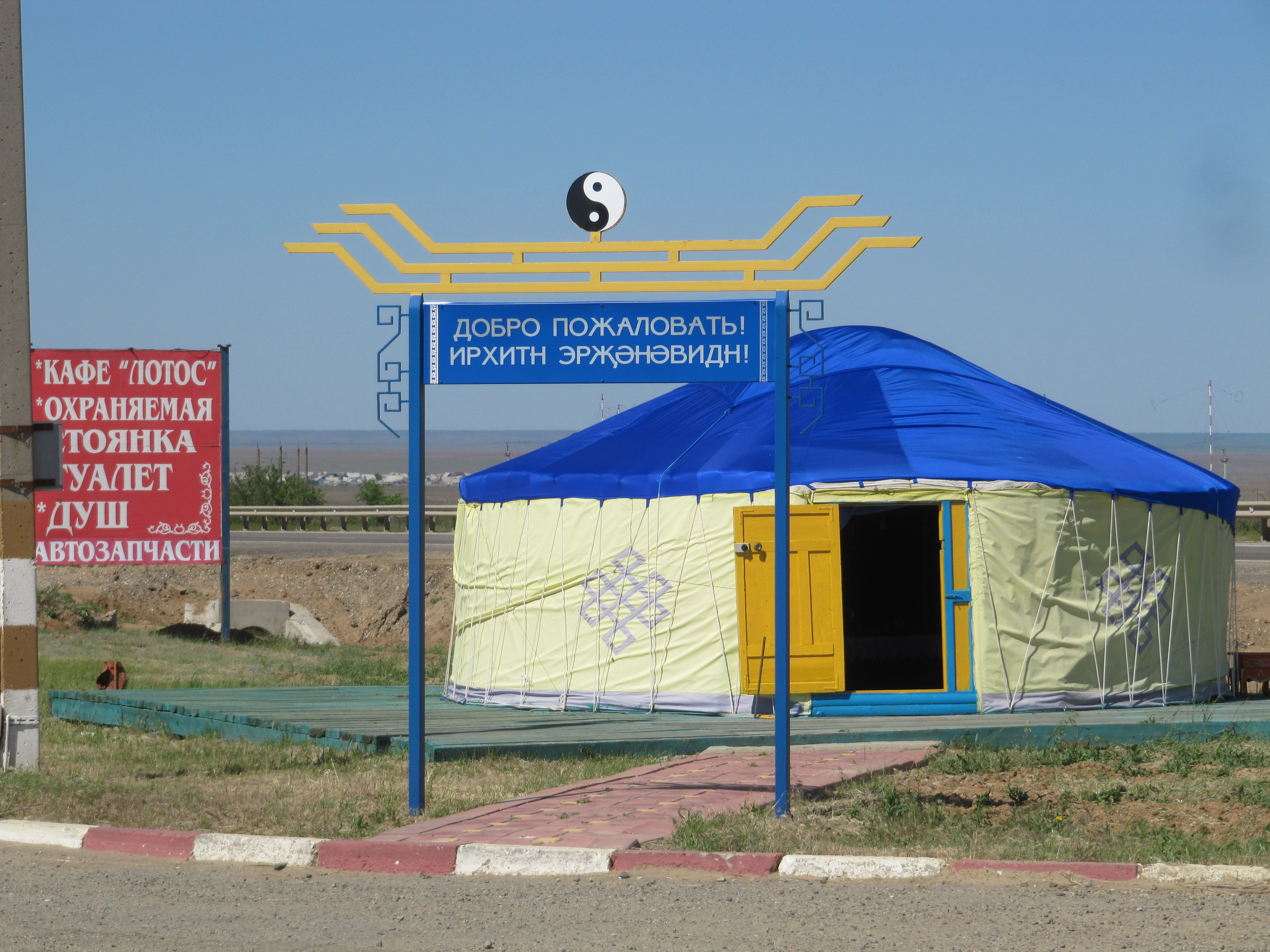 Кибитка в Калмыкии на трассе Волгоград -Элиста, около Элисты